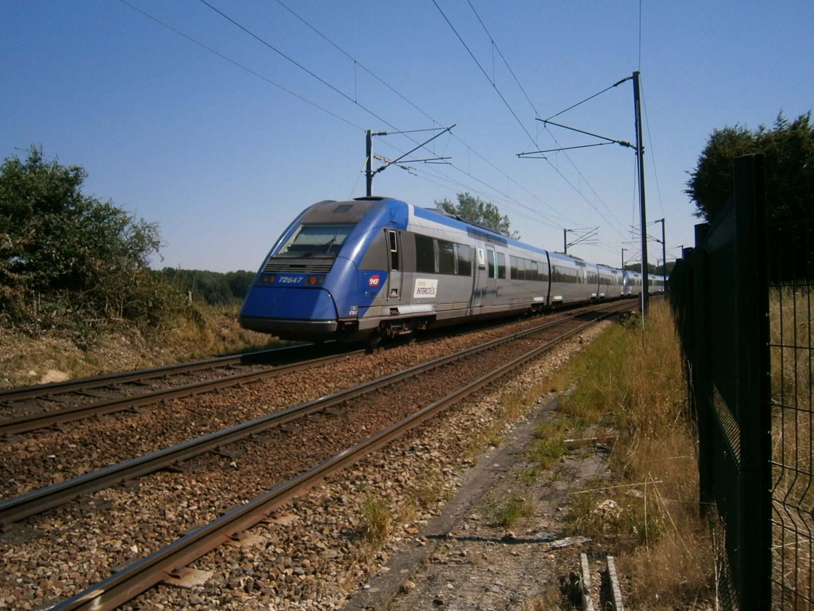 Une UM de X 72500 roule sur la ligne de Saint-Cyr à Surdon, à Tacoignières (78). Elle assure une mission Intercités, de Granville à Paris-Vaugirard.